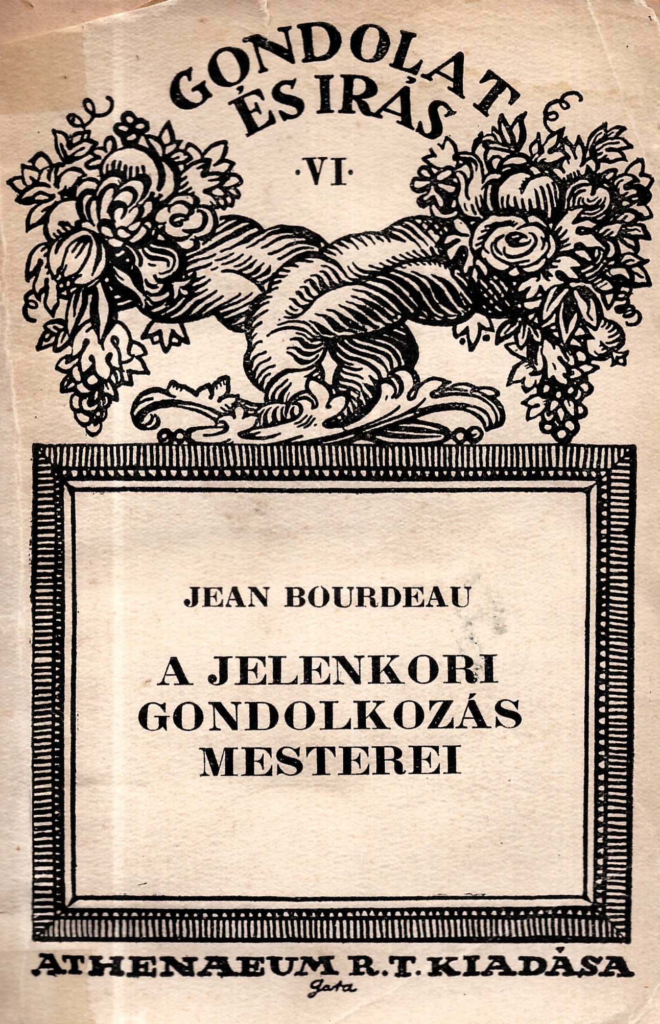 Jean Bourdeau (1848-1928): A jelenkori gondolkozás mesterei (1910 k.)